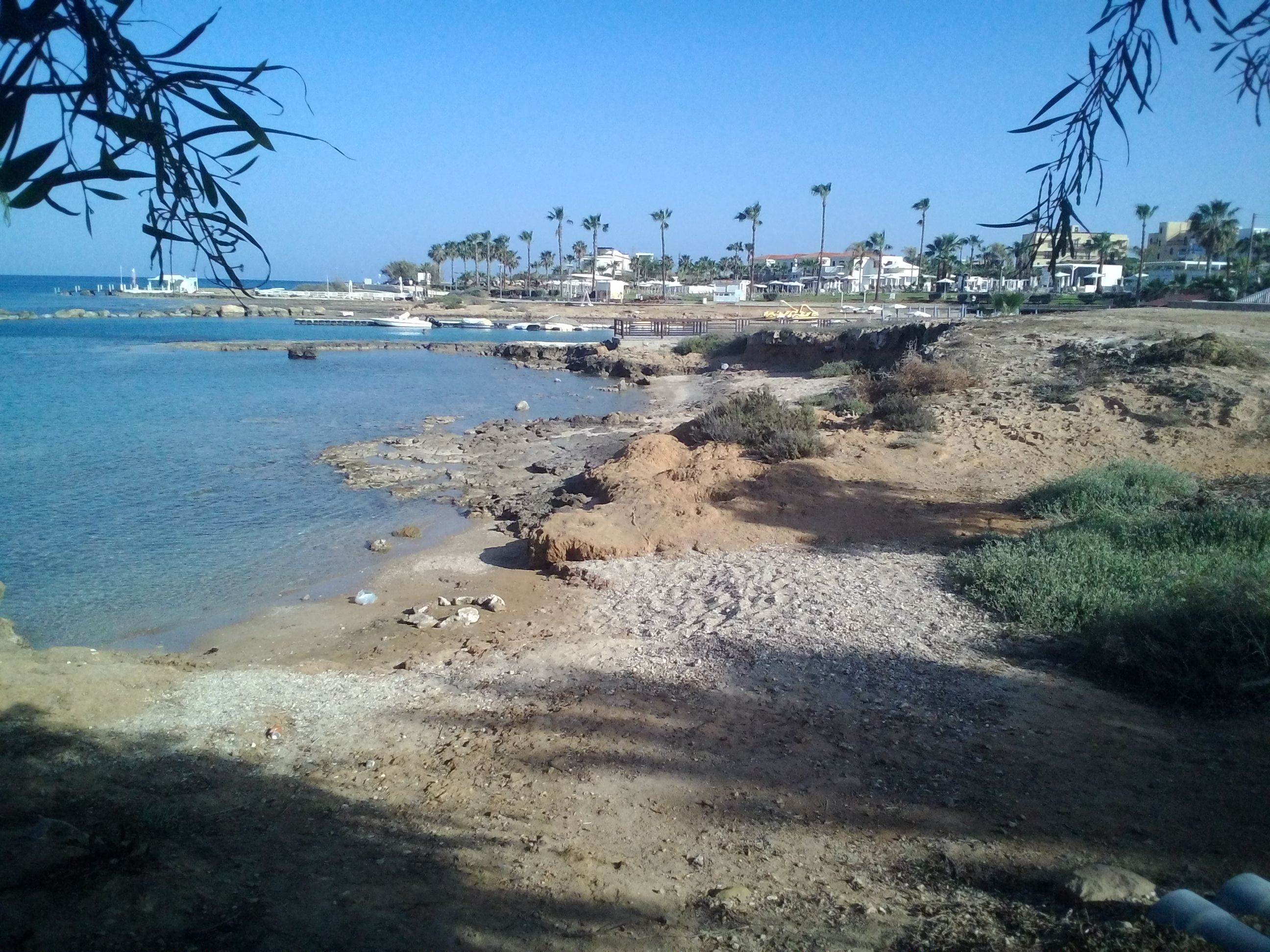 Пляж у Протарасі поблизу готелю Анастасія